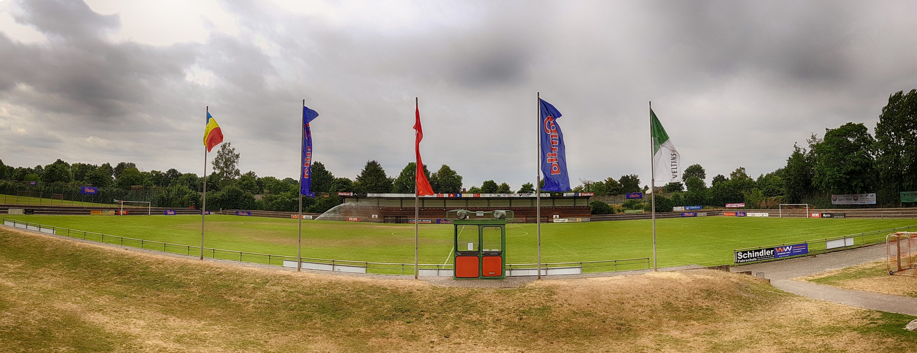 Panorama des A-Platzes Sportanlagen Mußriede